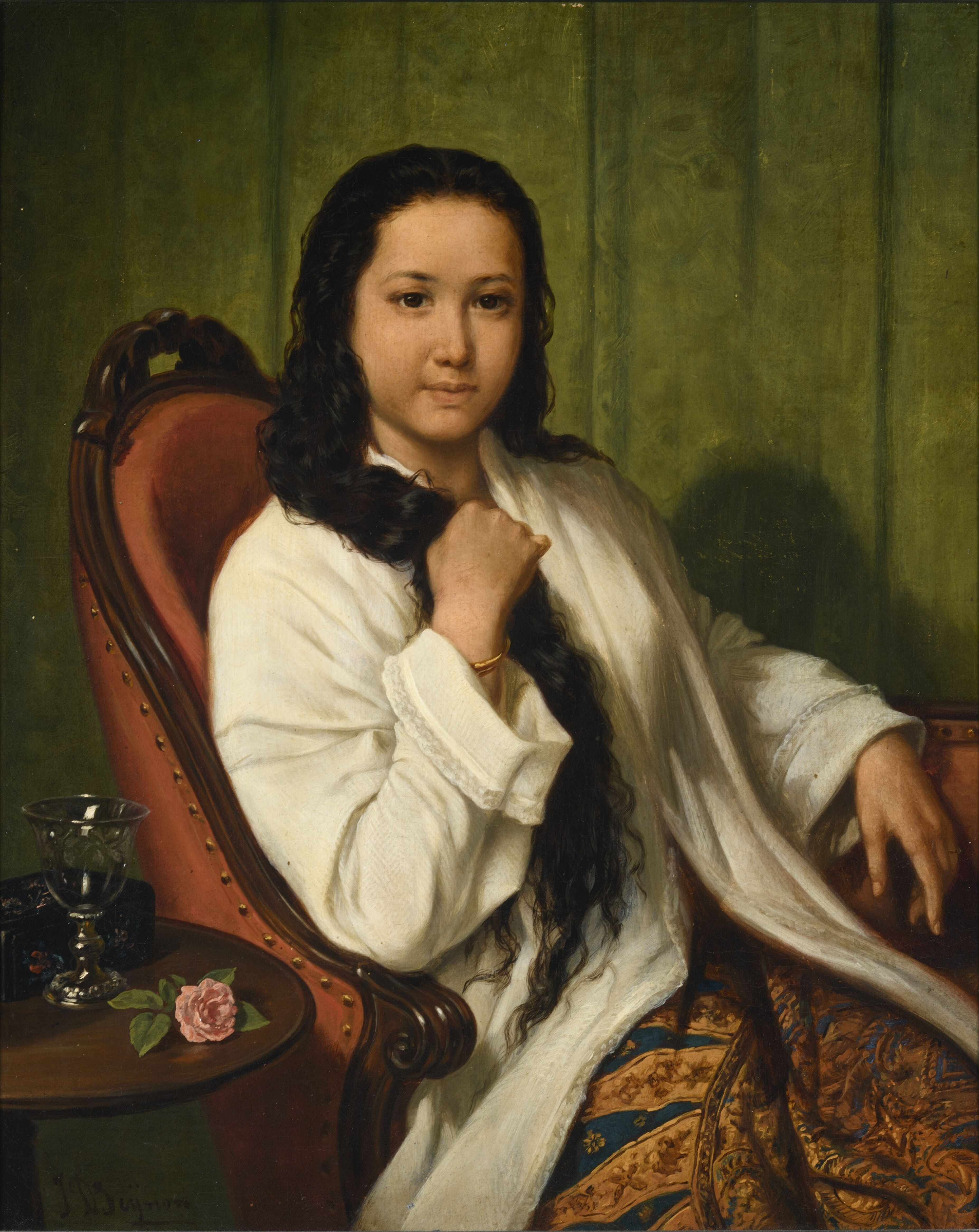 Olieverfschilderij. J.D. Beynon werd in 1830 geboren in Batavia. Na zijn opleiding in Amsterdam aan de Koninklijke Academie keerde hij in oktober 1855 terug en vestigde zich in Batavia. Hij stierf op 29 juli 1877.